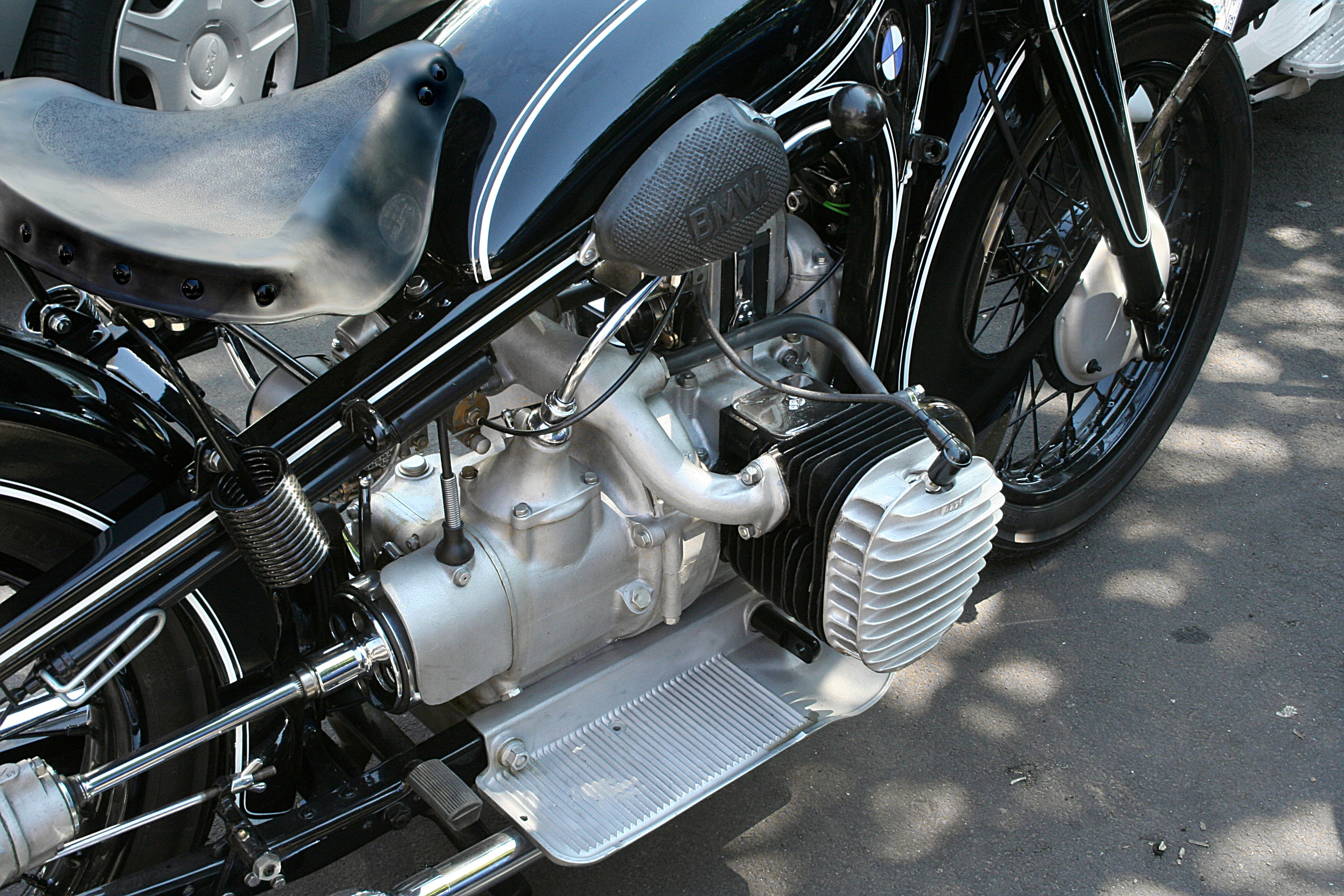 BMW R 12, Baujahr 1940 (Motor 745 cm³) bei der Oldtimerrallye „2000 km durch Deutschland“, Eigentürmer des Fahrzeugs: BMW Mobile Tradition